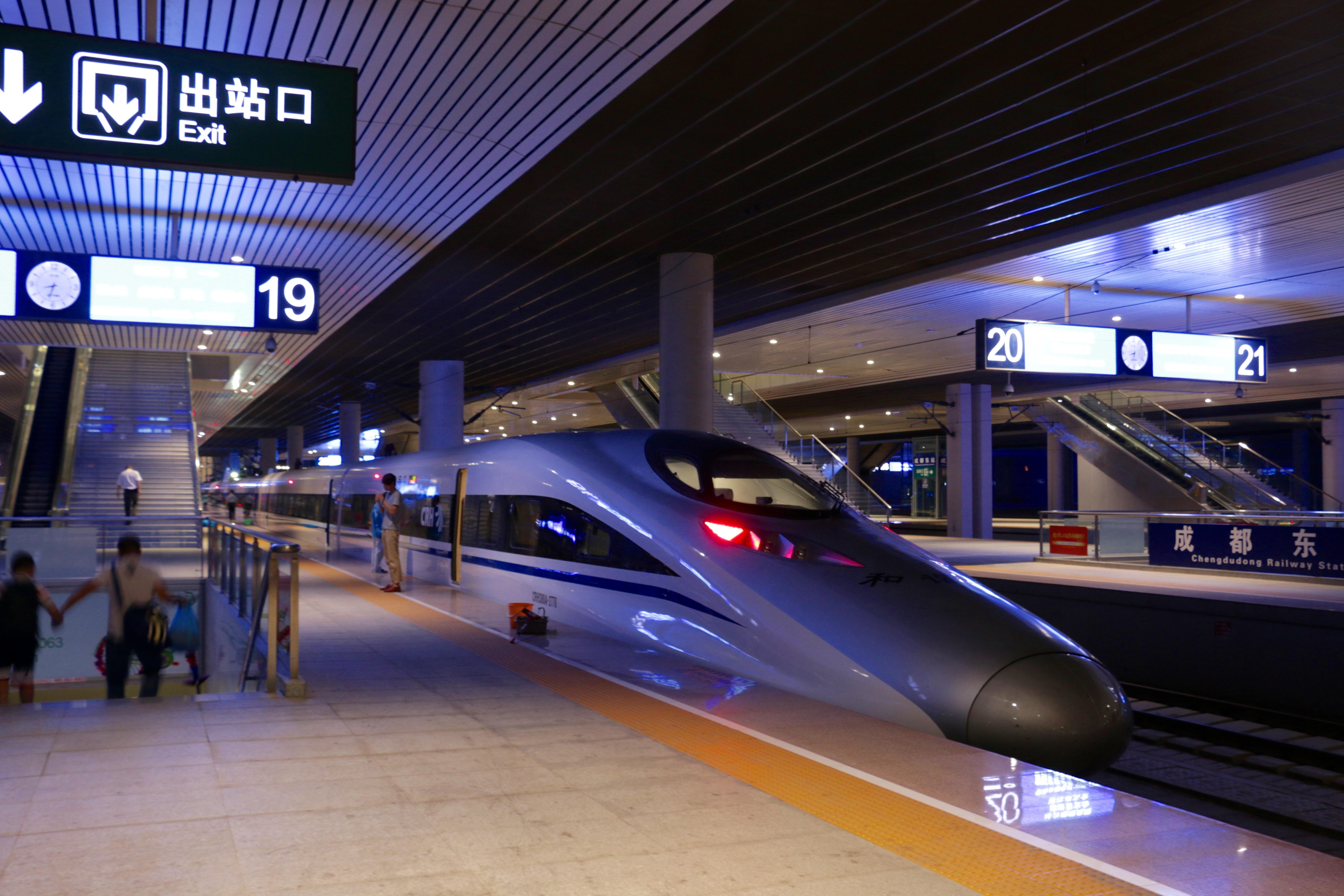 中文（中国大陆）: CRH380A-2770于成都东站